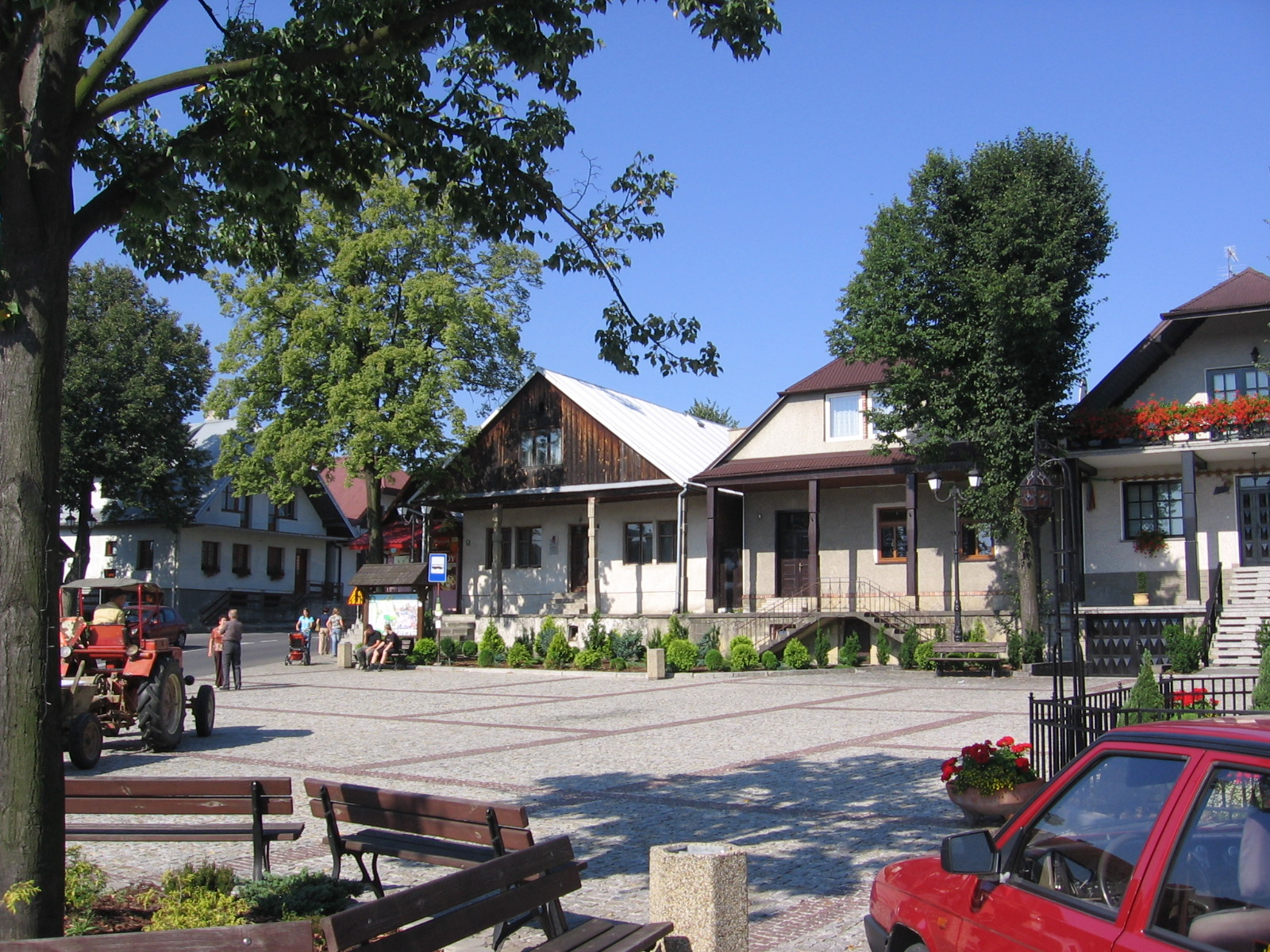 zespół staromiejski Lipnica Murowana, Lipnica Murowana